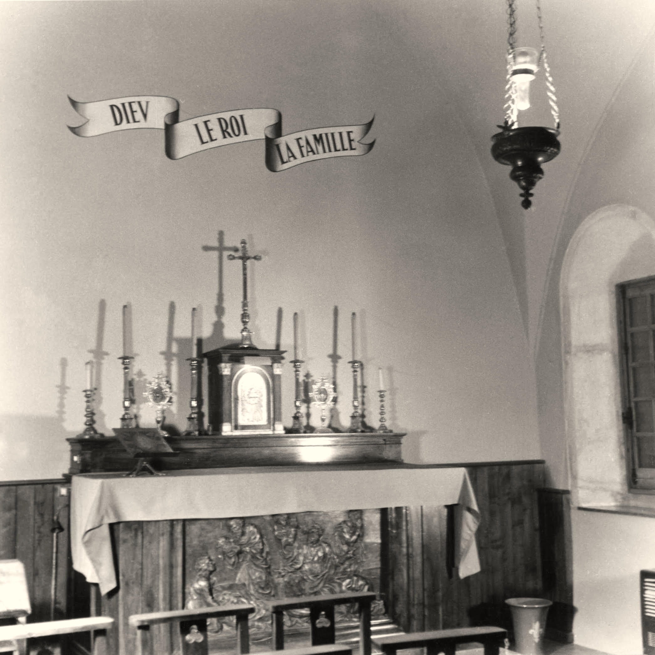 La Chapelle du Château de Hautefort, lieu de sépulture de plusieurs membres de la famille de Clermont. Collection familiale. Photo prise en 1930